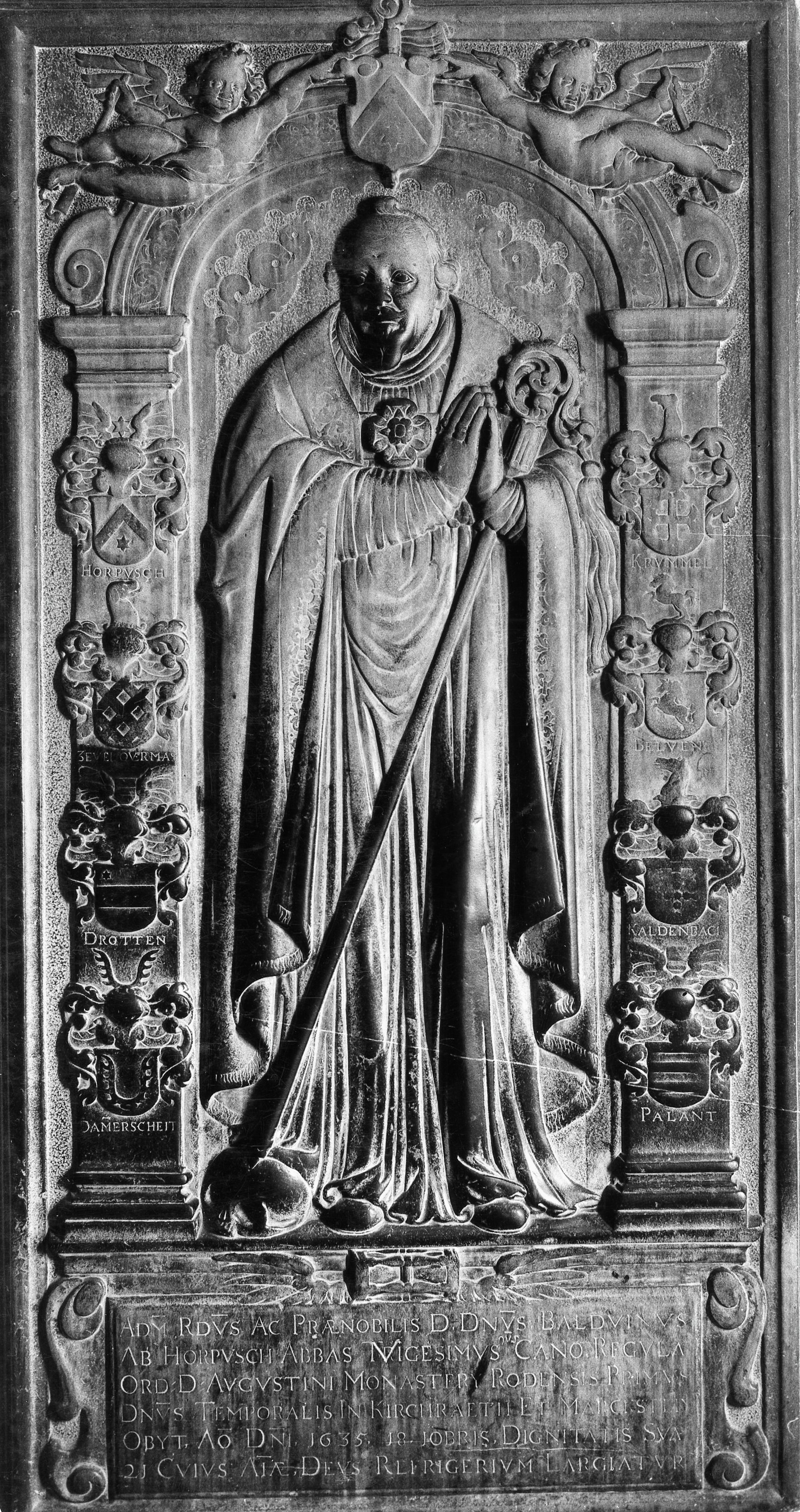 Abdijkerk Rolduc: grafsteen van de abt Balduin van Wallum van Horpusch (overleden 1635).